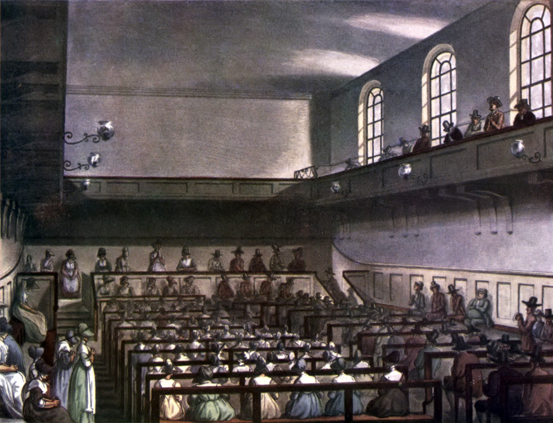 Quakers' Meeting